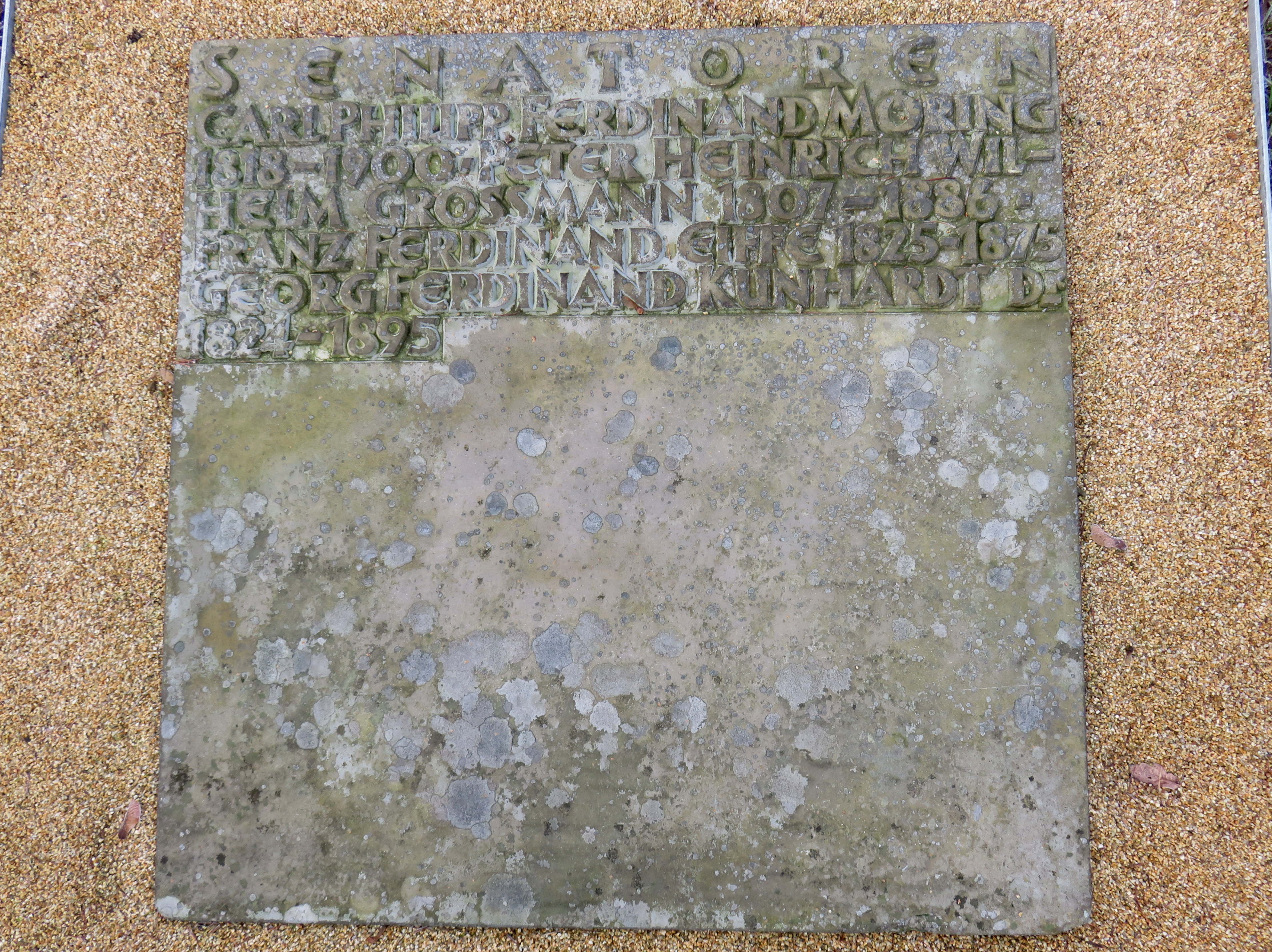 Sammelgrab Senatoren (IV) im Bereich des Althamburgischen Gedächtnisfriedhofs auf dem Hamburger Friedhof Ohlsdorf zu Ehren von unter anderen Carl Möring, Peter Heinrich Wilhelm Großmann, Franz Ferdinand Eiffe, Ferdinand Kunhardt.